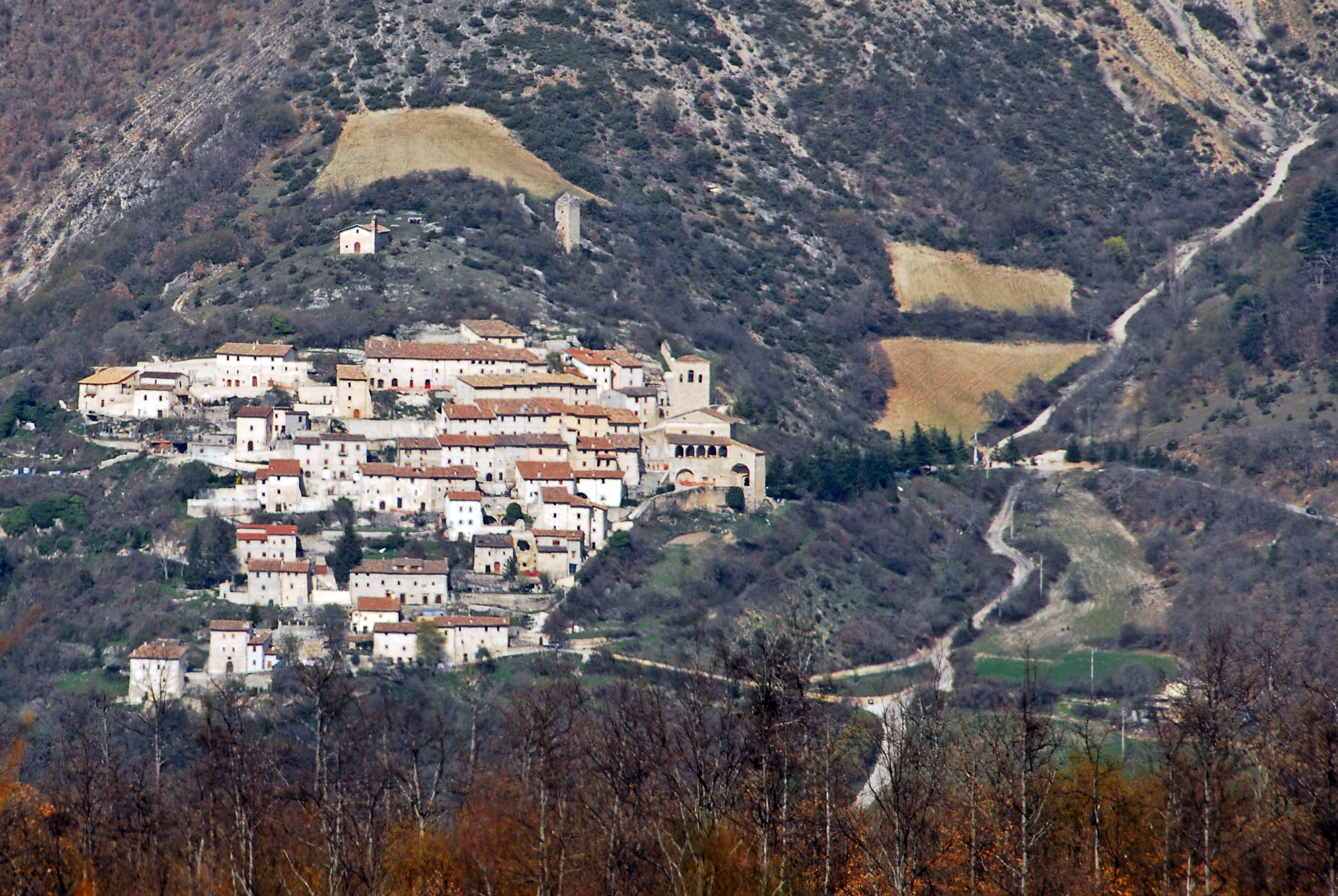 Campi di Norcia